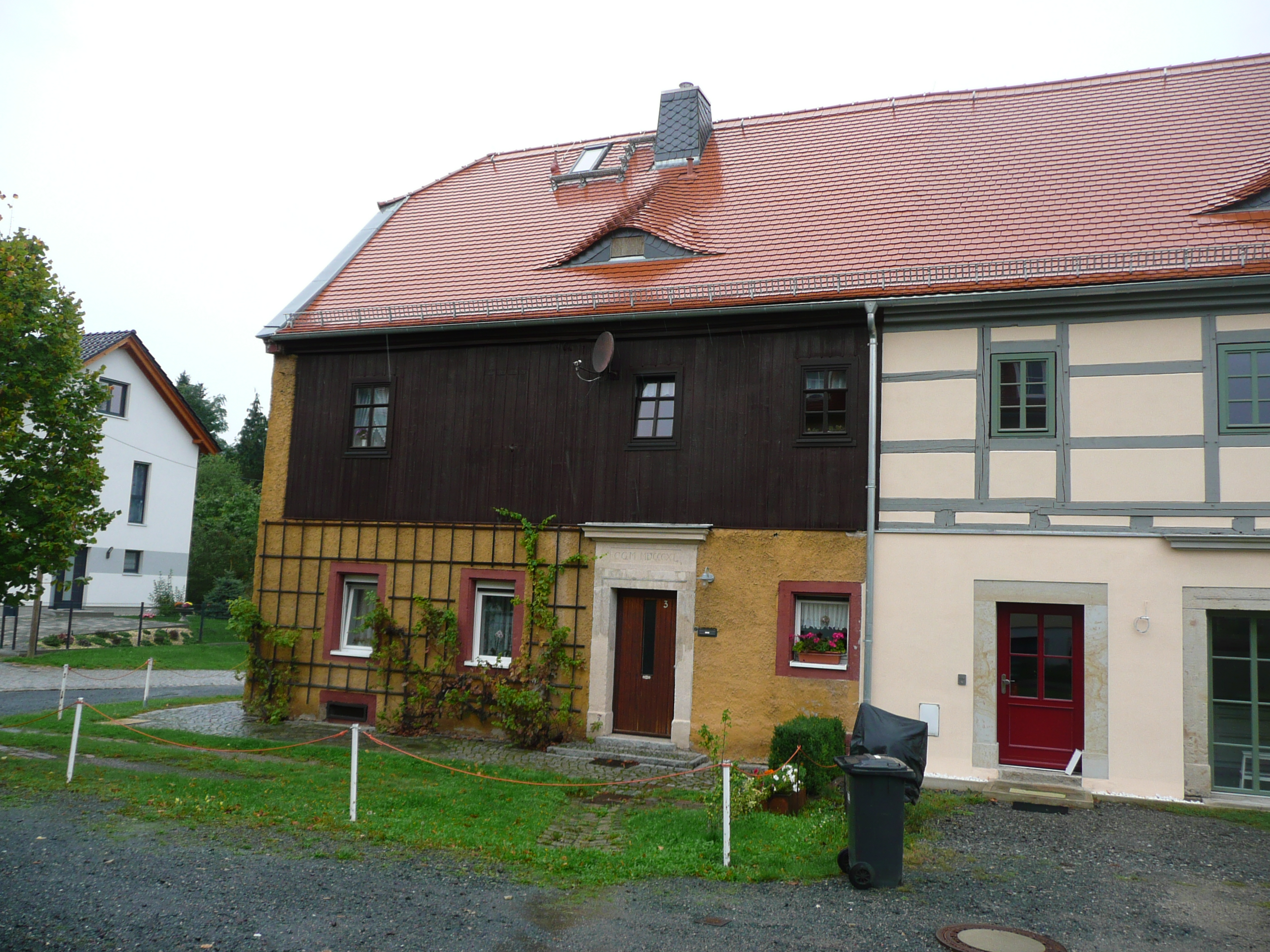 Dresden-Wölfnitz-Haus Altwölfnitz 3-3a